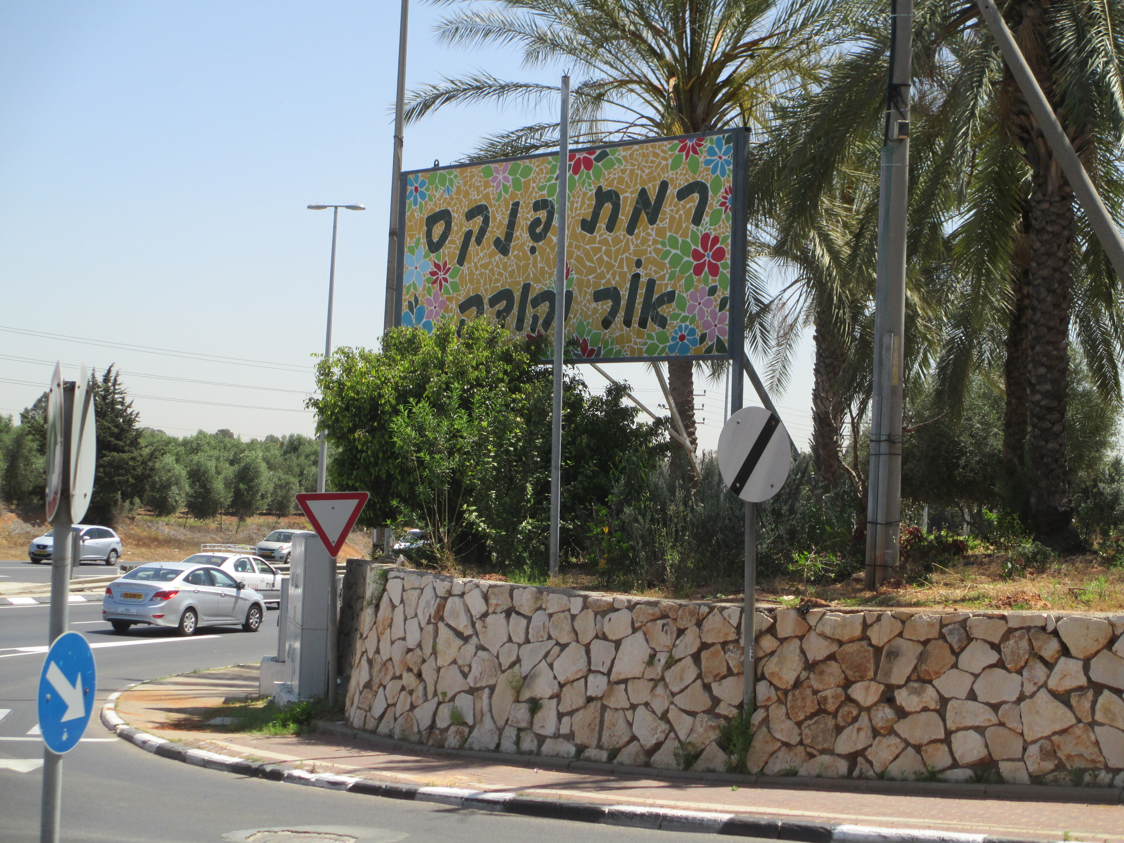 הכניסה לרמת פנקס